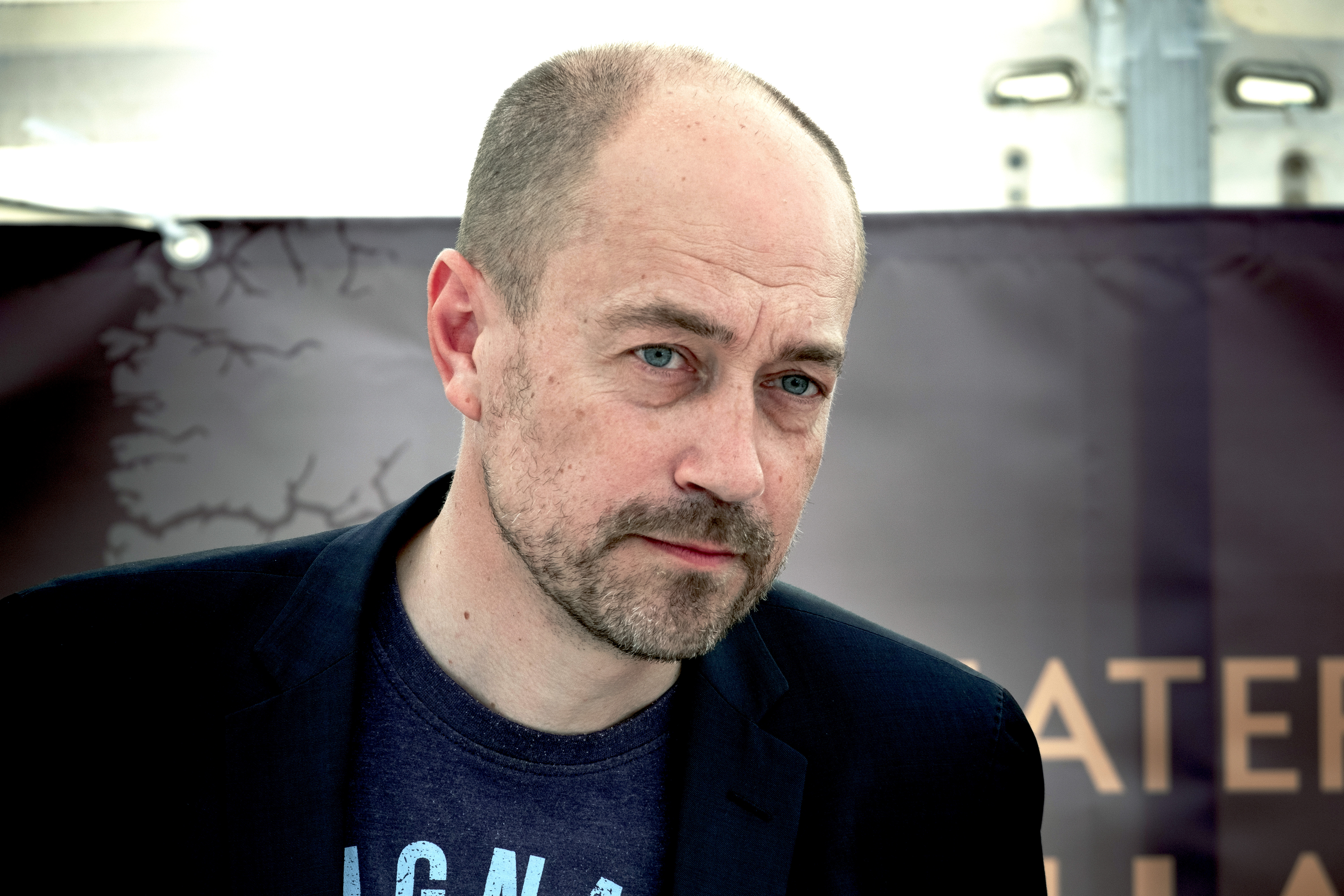 20190614. Folkemødet i Allinge på Bornholm, Greater Copenhagen tältet. Magnus Heunicke, socialdemokratisk folketingsledamot och tidigare transportminister och ministertippad på nytt. Photo: News Øresund - Johan Wessman © News Øresund - Johan Wessman (CC BY 3.0). Detta verk av News Øresund är licensierat under en Creative Commons Erkännande 3.0 Unported-licens (CC BY 3.0). Bilden får fritt publiceras under förutsättning att källa anges. .The picture can be used freely under the prerequisite that the source is given. News Øresund, Malmö, Sweden News Øresund är en oberoende regional nyhetsbyrå som är en del av det oberoende dansk-svenska kunskapscentrat Øresundsinstituttet.. .